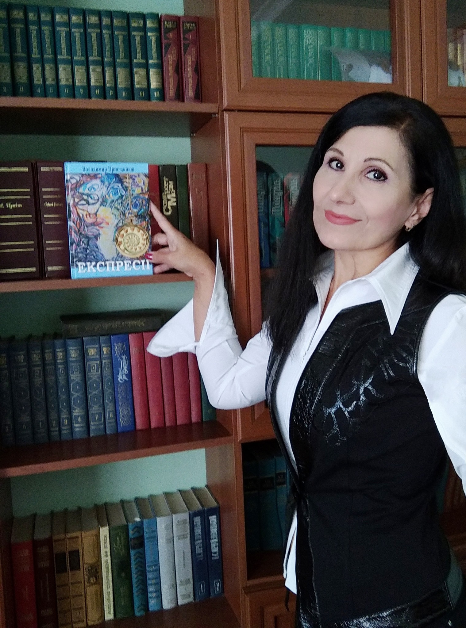 За читанням